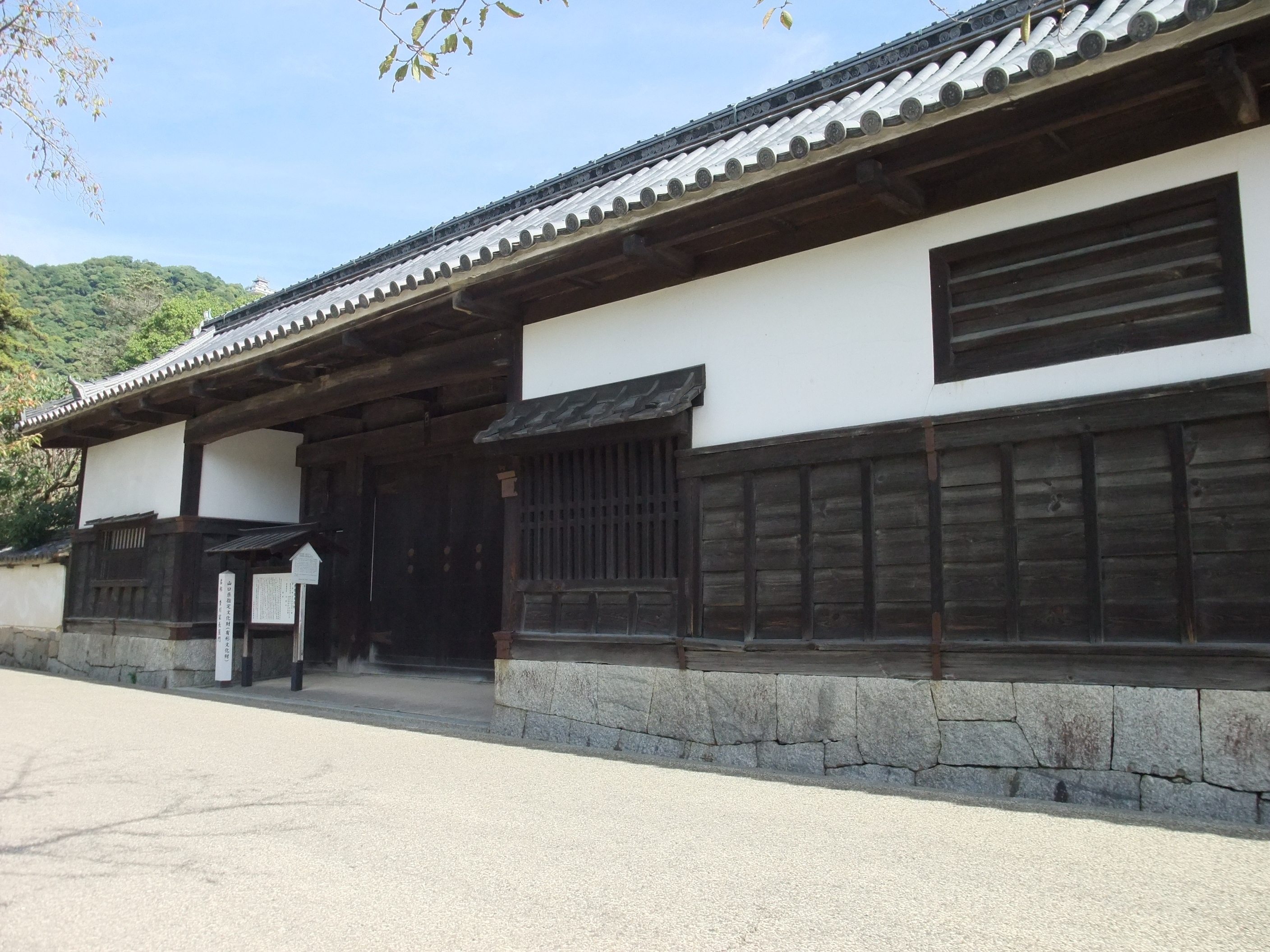 香川家長屋門、山口県岩国市横山